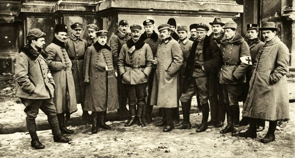 Komenda Obrony Lwowa 1918. Lech Gluziński, Wawrzyniec Dayczak, Stanisław Bac, Tadeusz Sielecki, Stanisław Nilski-Łapiński, Julian Stasiniewicz ps. Kmita, Czesław Mączyński, Ajdukiewicz, Antoni Jakubski, Wacław Mejbaum, Stanisław Borkowski, Browiński, Ludwik de Laveaux, Zygmunt Pieracki, Lesław Węgrzynowski, Albin Garbień, Kazimierz Rechawicz ps. Rak.